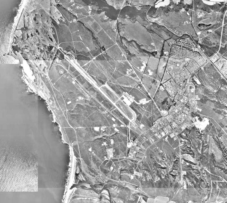 Vandenberg AFB California